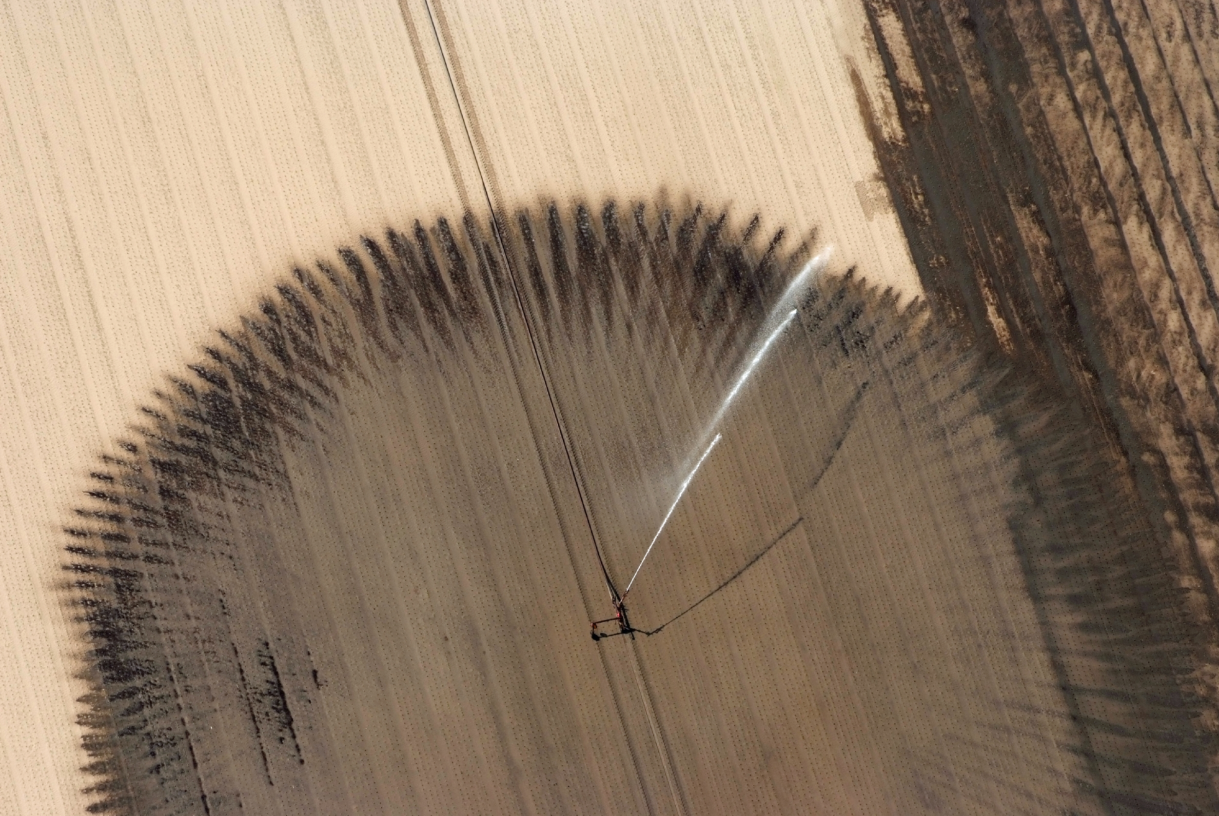 Fotoflug von Nordholz-Spieka nach Oldenburg und Papenburg